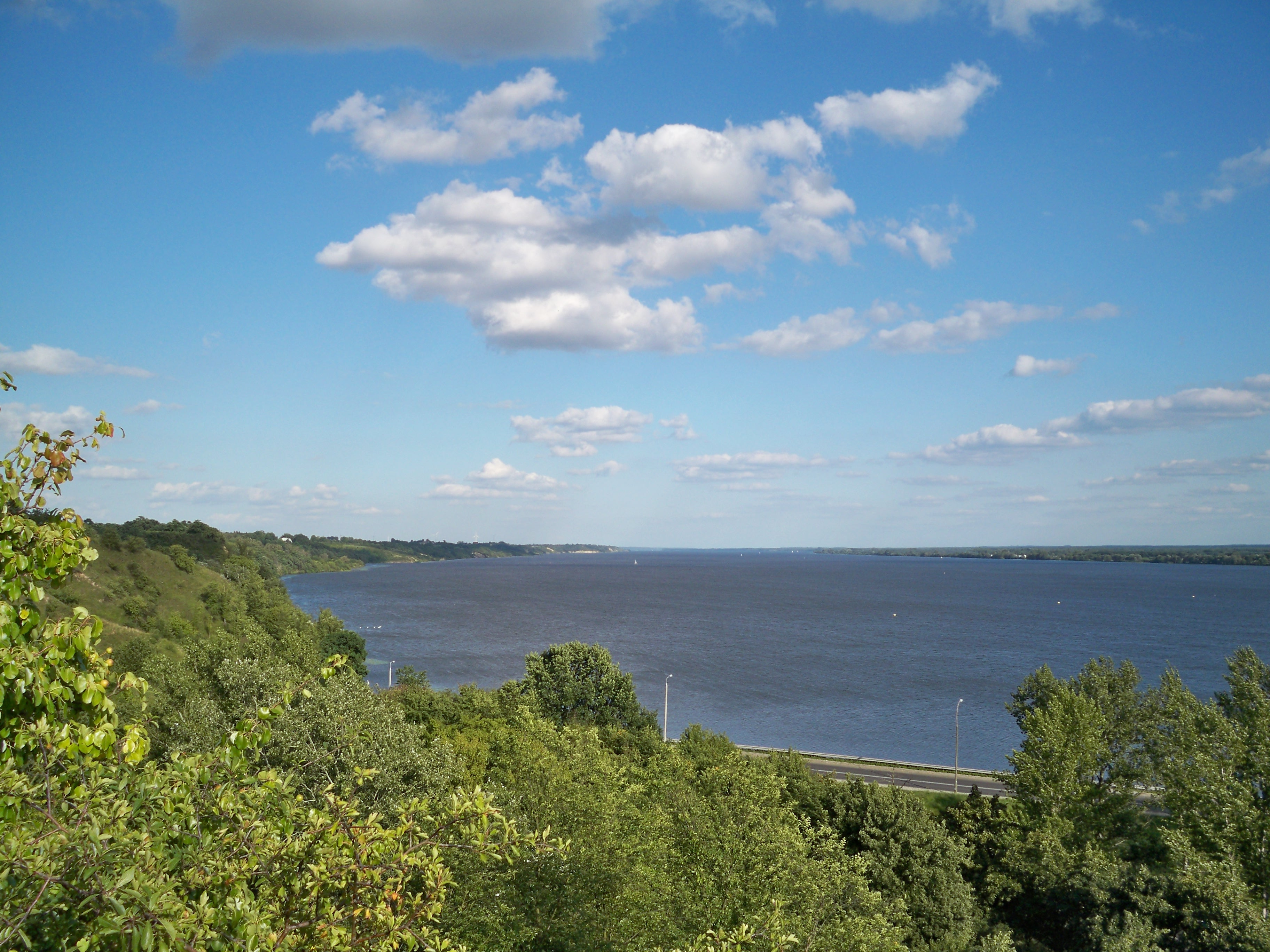 Wisła (2009 r.)